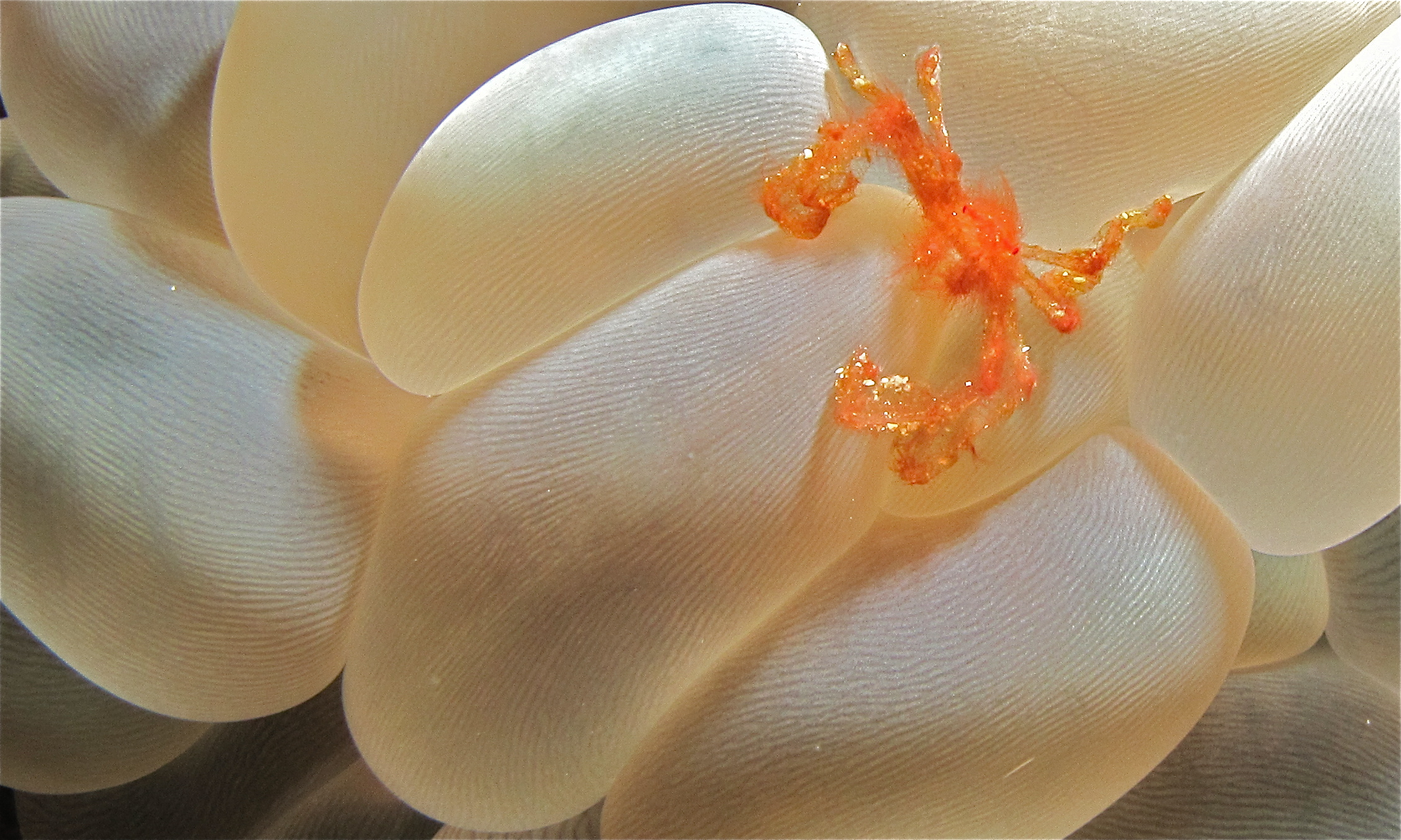 Likuan I, Bunaken Island, Sulawesi, INDONESIA